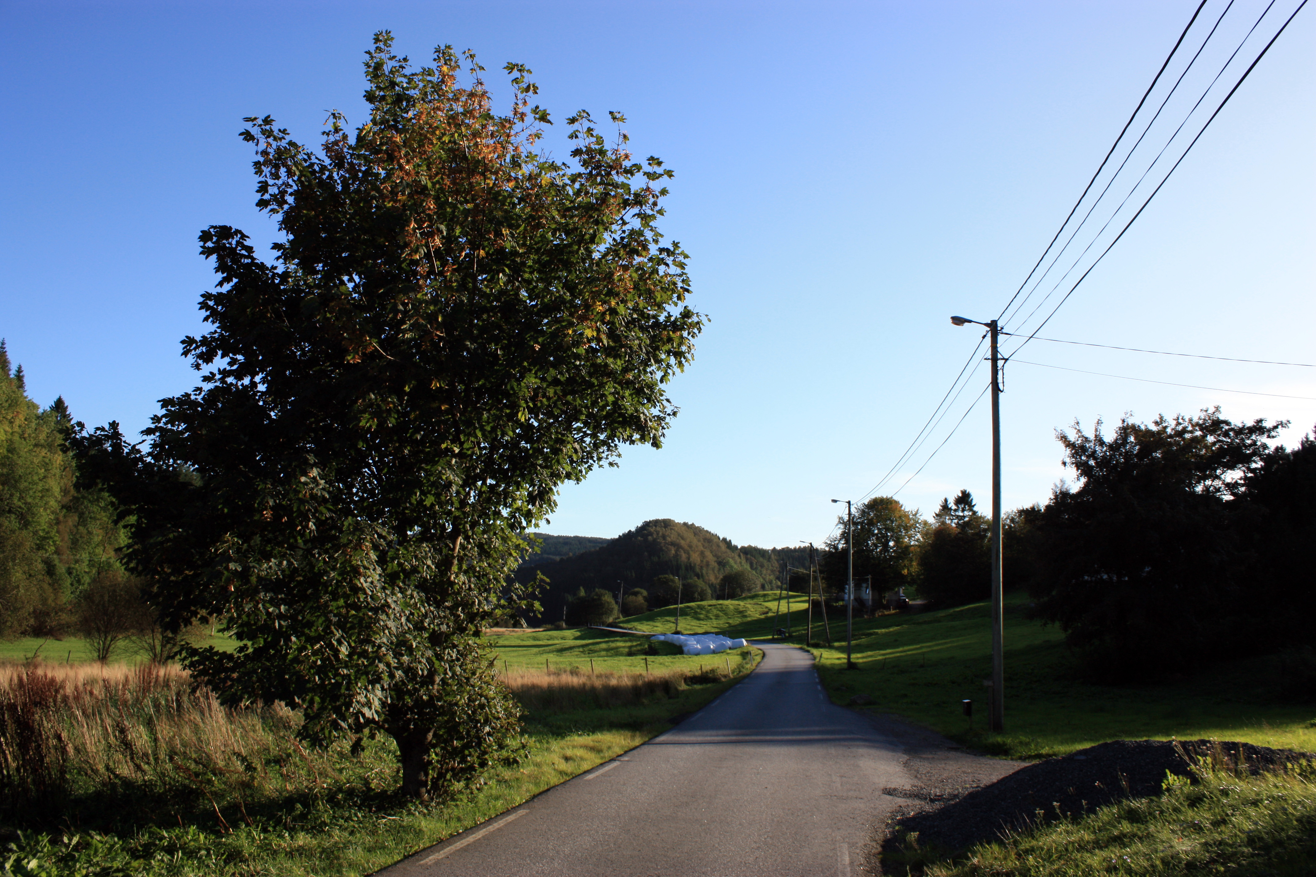 Dyngelandsvegen Fana, Bergen.